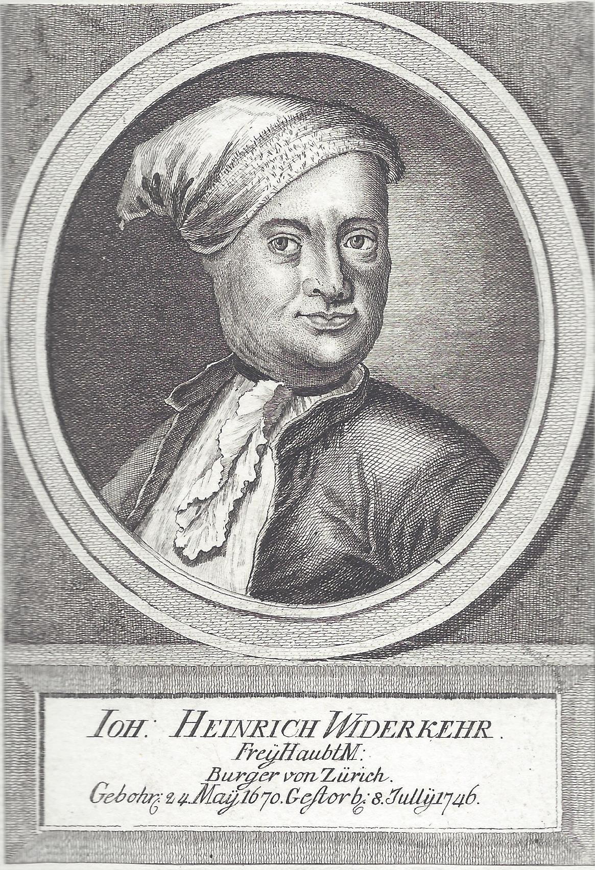 Anonymer Stich des Zürcher Aufrührers Johann Heinrich Widerkehr um 1790. Bemerkenswert ist die Darstellung Widerkehrs mit einer Phygischen Mütze, was auf eine Enstehung des Blattes um 1790 weist. Ein weiterer Abzug findet sich in der Herzog August Bibliothek Wolfenbüttel unter der Inventarnummer I 14526.3 bezeichnet als Brustb. nach hl., Kopf nach hr. gewandt, im Hauskostüm mit Zipfelmütze (sic!).